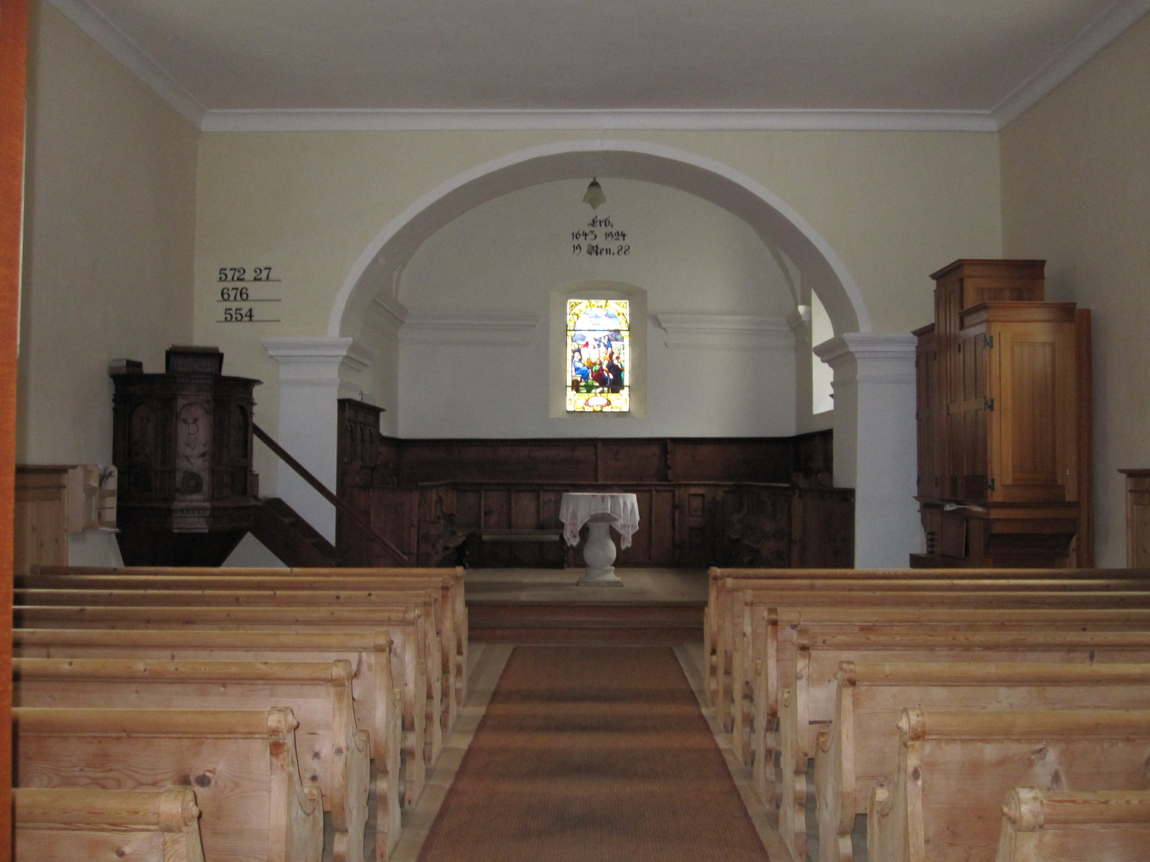 reformierte Kirche Nufenen (Kanton Graubünden)